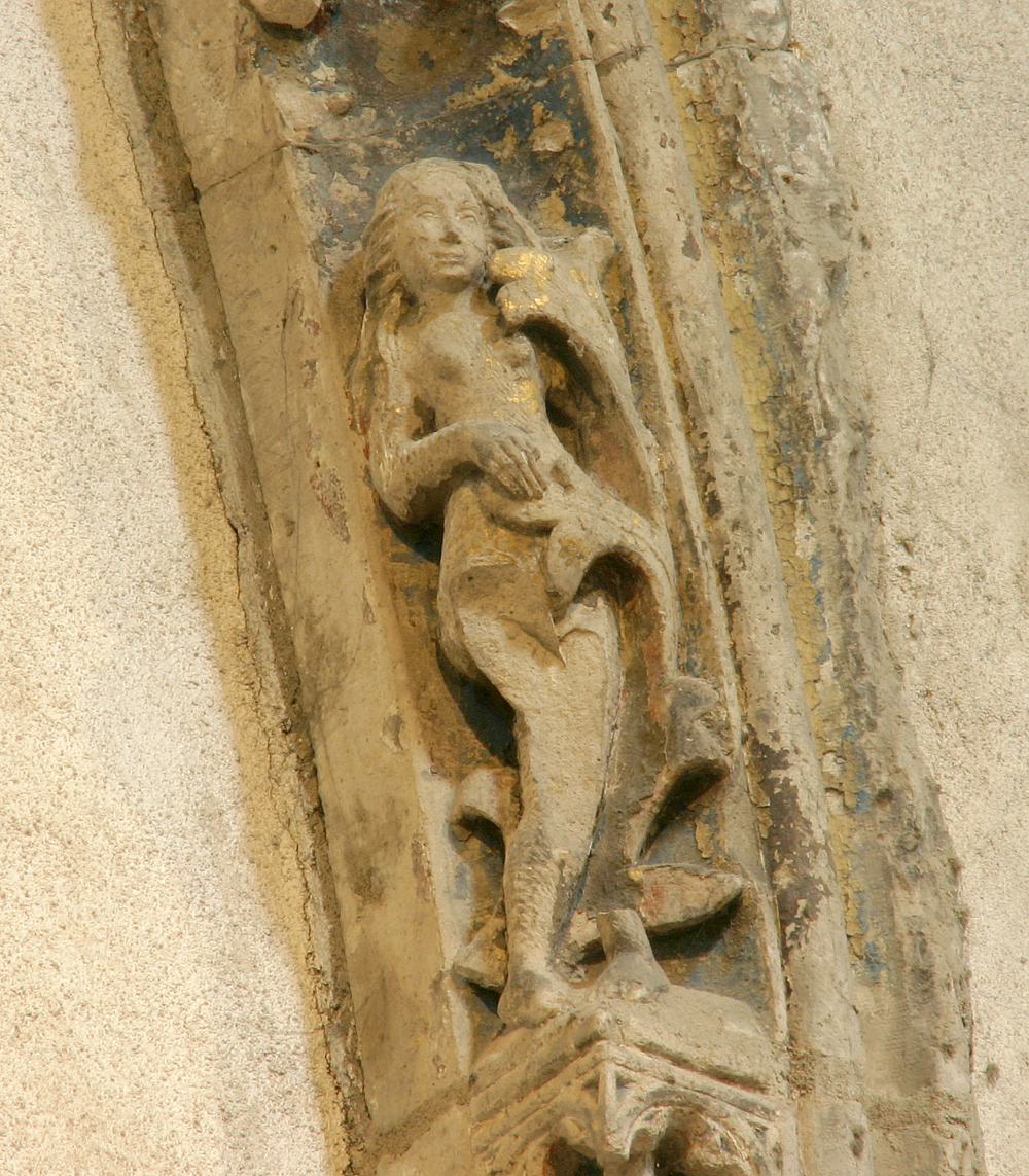 Groß St. Martin, Köln. Gotischer Rankbogen um Kreuzaltar, Detail: Skulptur Eva